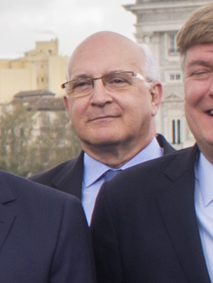 _SAM9166